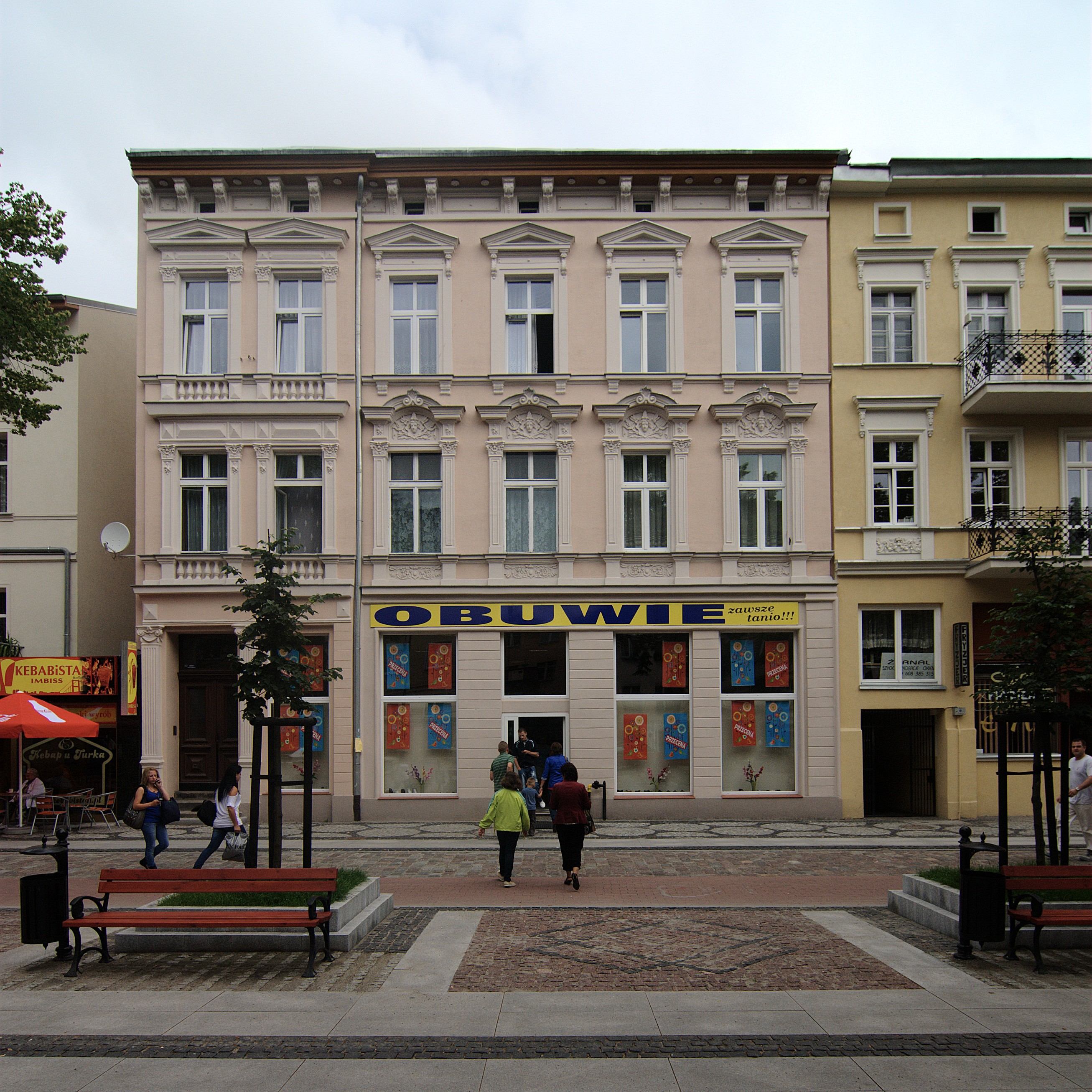 Słupsk. Aleja Wojska Polskiego 5.